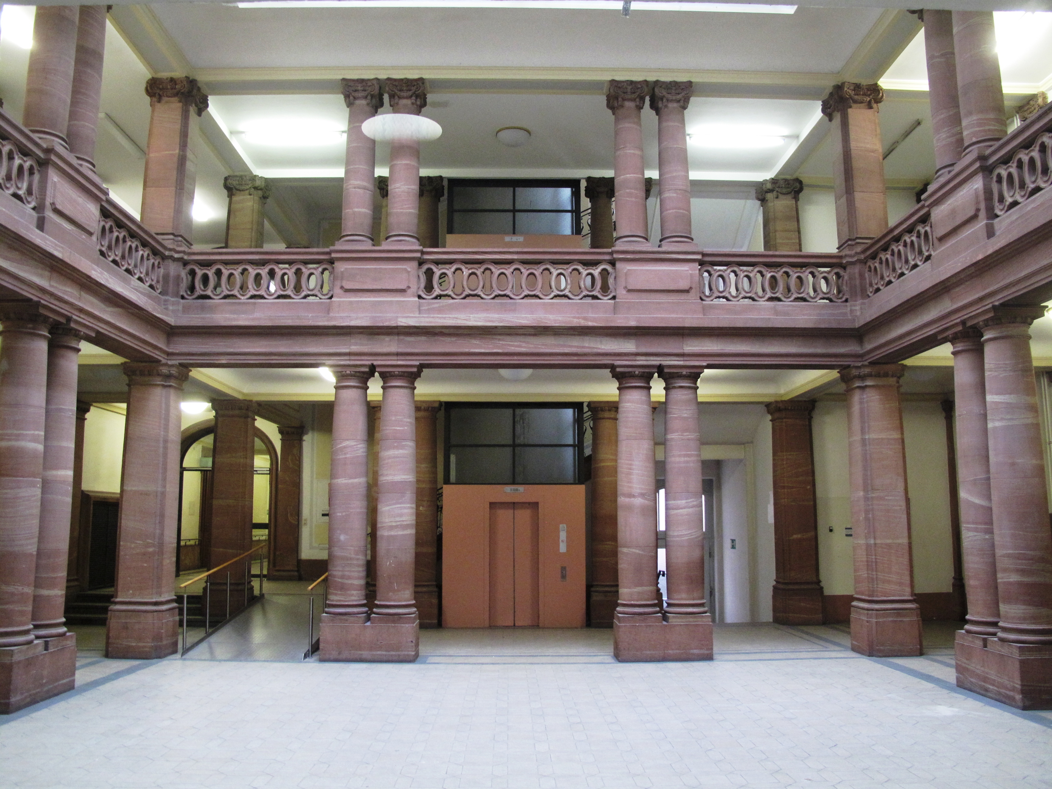 Eingangshalle des Jügelhauses, Uni-Campus Bockenheim